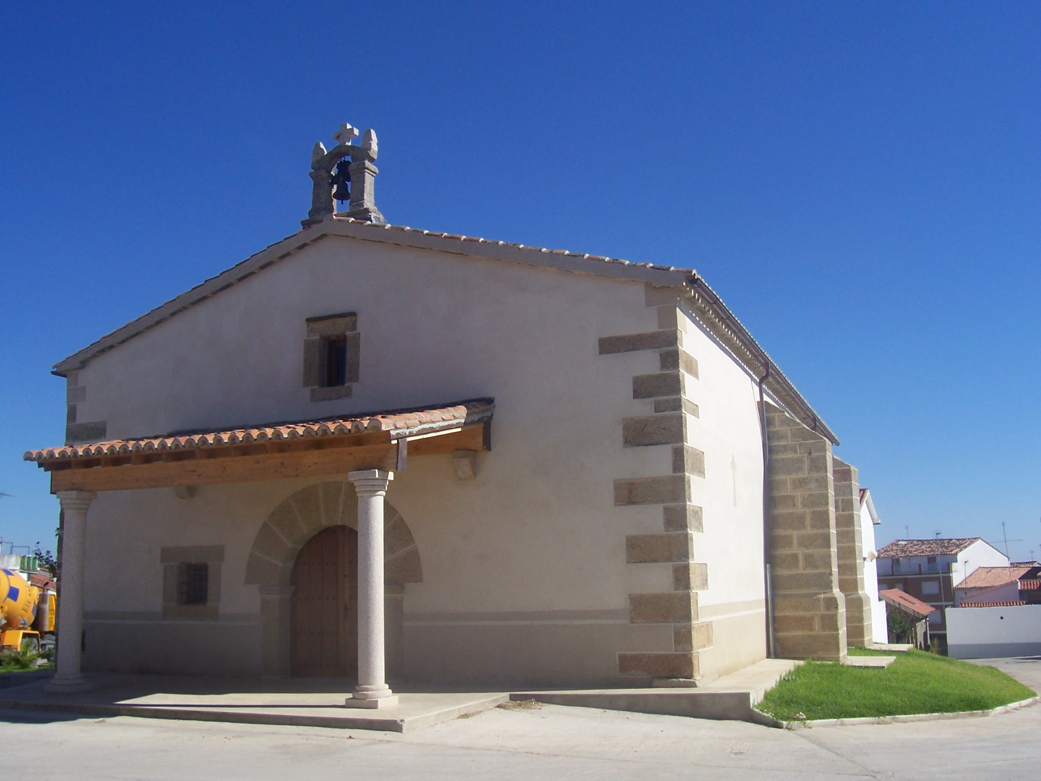 Ermita de San Bartolomé y San Blas, en Montehermoso, Cáceres, España